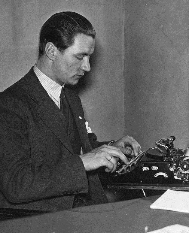 portrett, mann, redaktør, sittende halvfigur ved skrivebord, skrivemaskin.